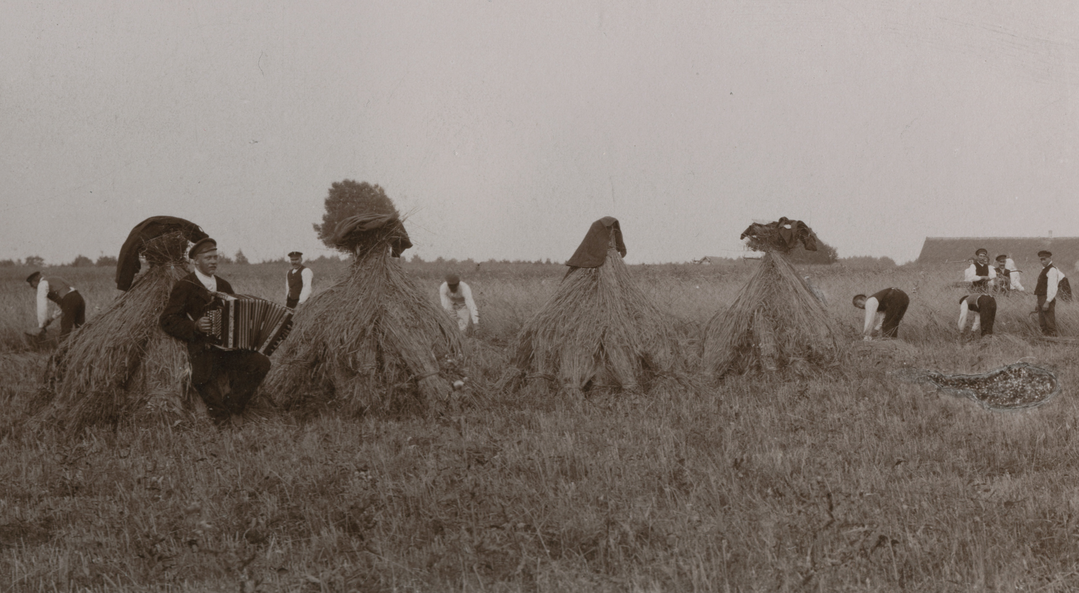 Rukkikoristuse talgud põllul.